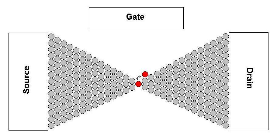 Dieses Bild zeigt den Aufbau eines atomaren Transistors